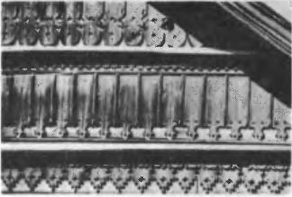 Магілёўская разьба. Фрагмент франтона жылога дома.